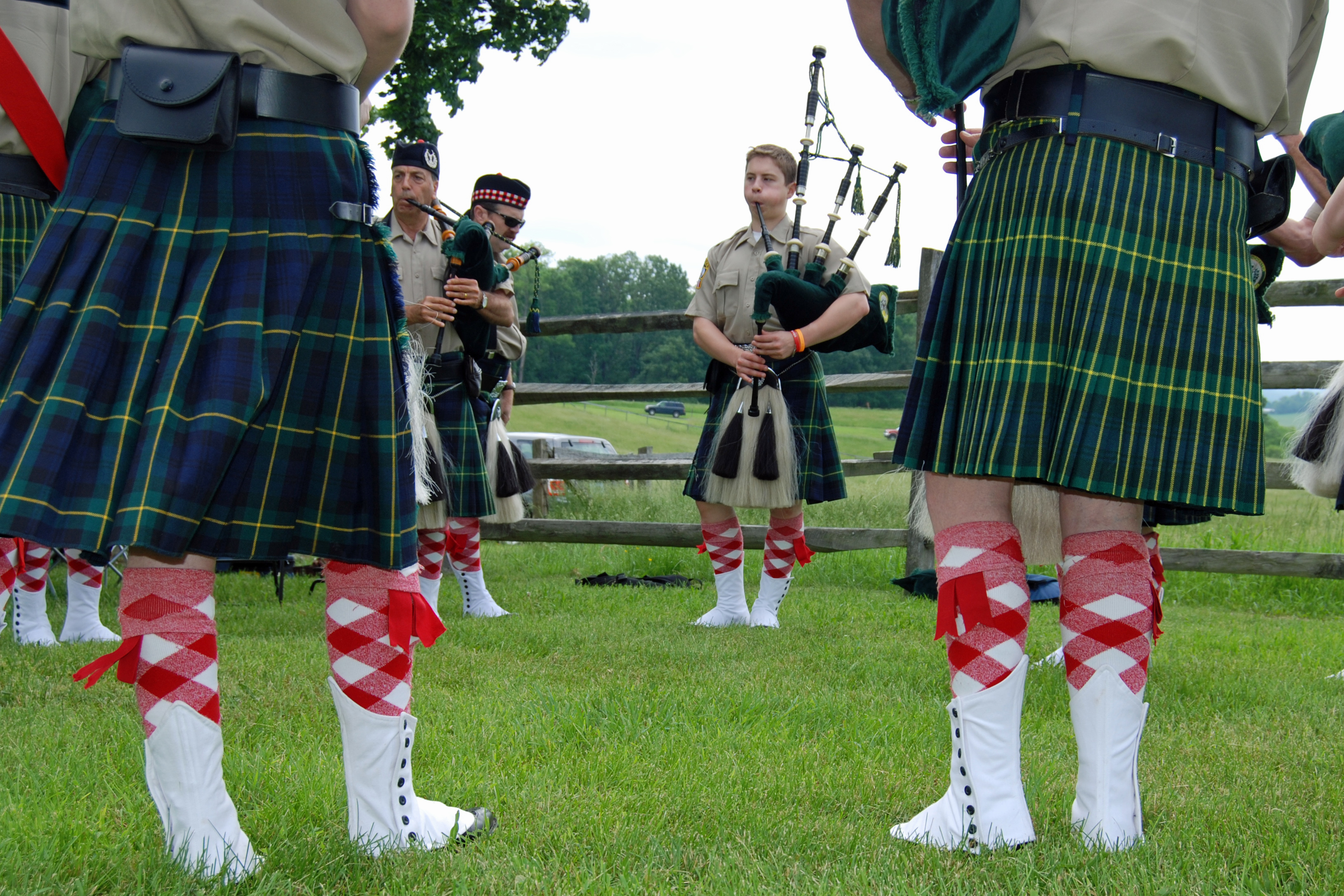 Bagpipe practice